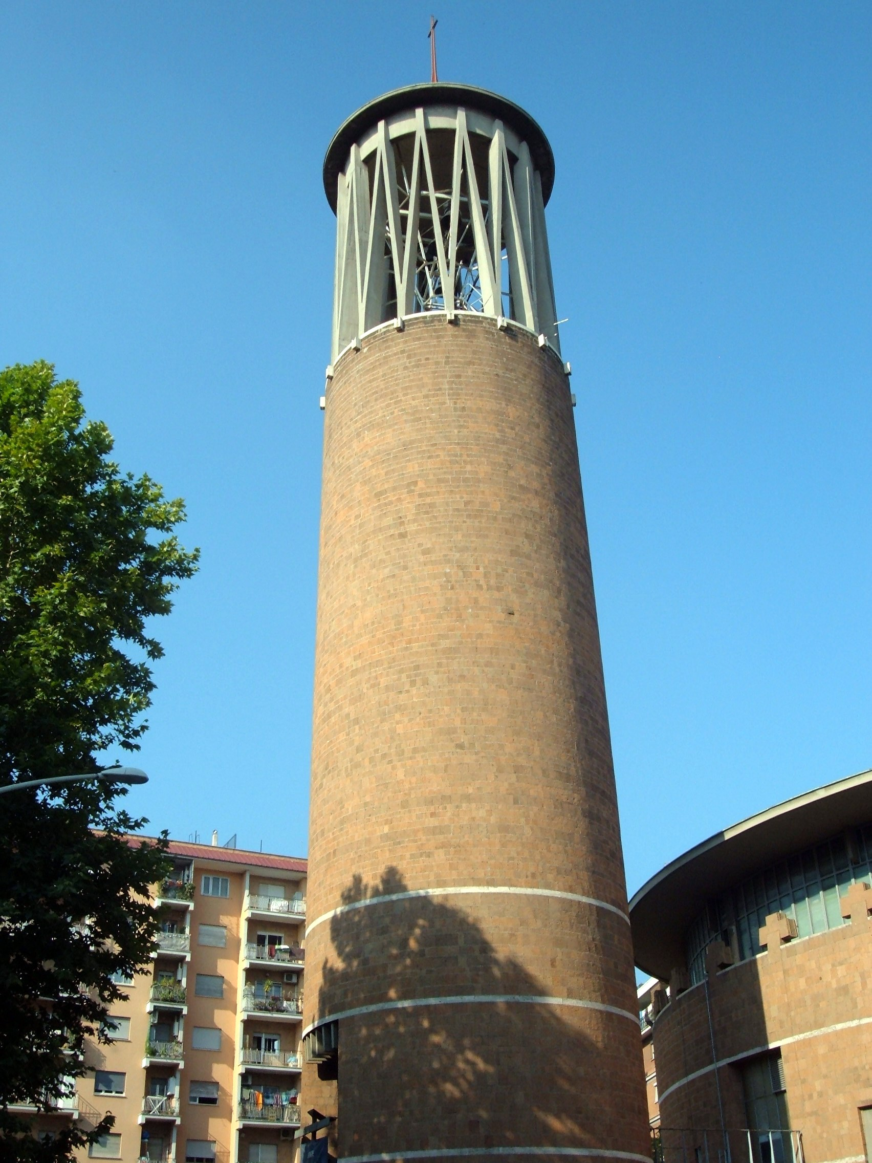 Chiesa di Gesù Divino Lavoratore, a Roma, nel quartiere Portuense.